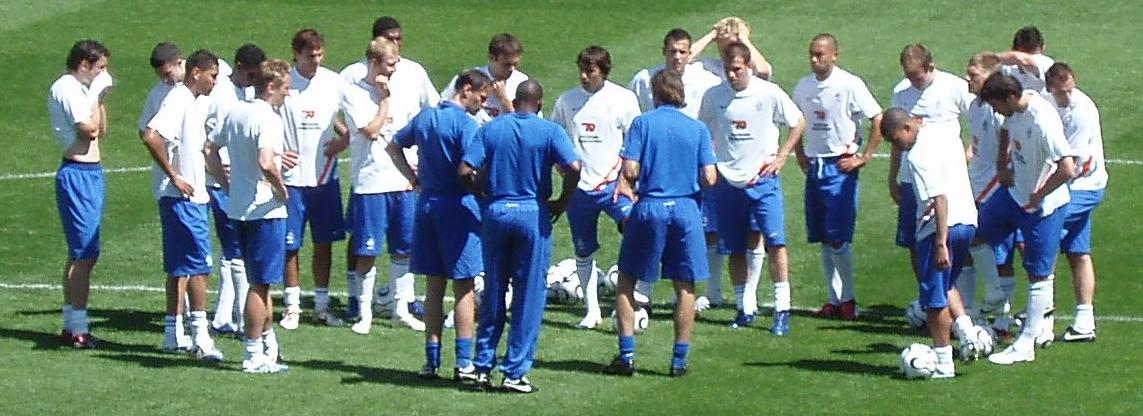 Netherlands national football team (cropped from original image). From left to right: Mark van Bommel, Robin van Persie, Hedwiges Maduro, Kew Jaliens, Jan Kromkamp, Khalid Boulahrouz, Tim de Cler, Ryan Babel, Marco van Basten, Phillip Cocu, Stanley Menzo, Giovanni van Bronckhorst, John van 't Schip, John Heitinga, Dirk Kuyt, Rafael van der Vaart, Denny Landzaat, Nigel de Jong, Arjen Robben, Stijn Schaars, Ruud van Nistelrooy, Jan Vennegoor of Hesselink, André Ooijer